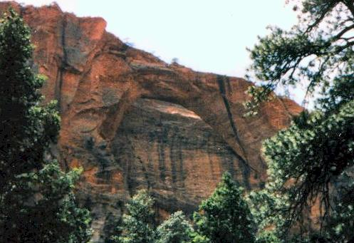 arco kolob